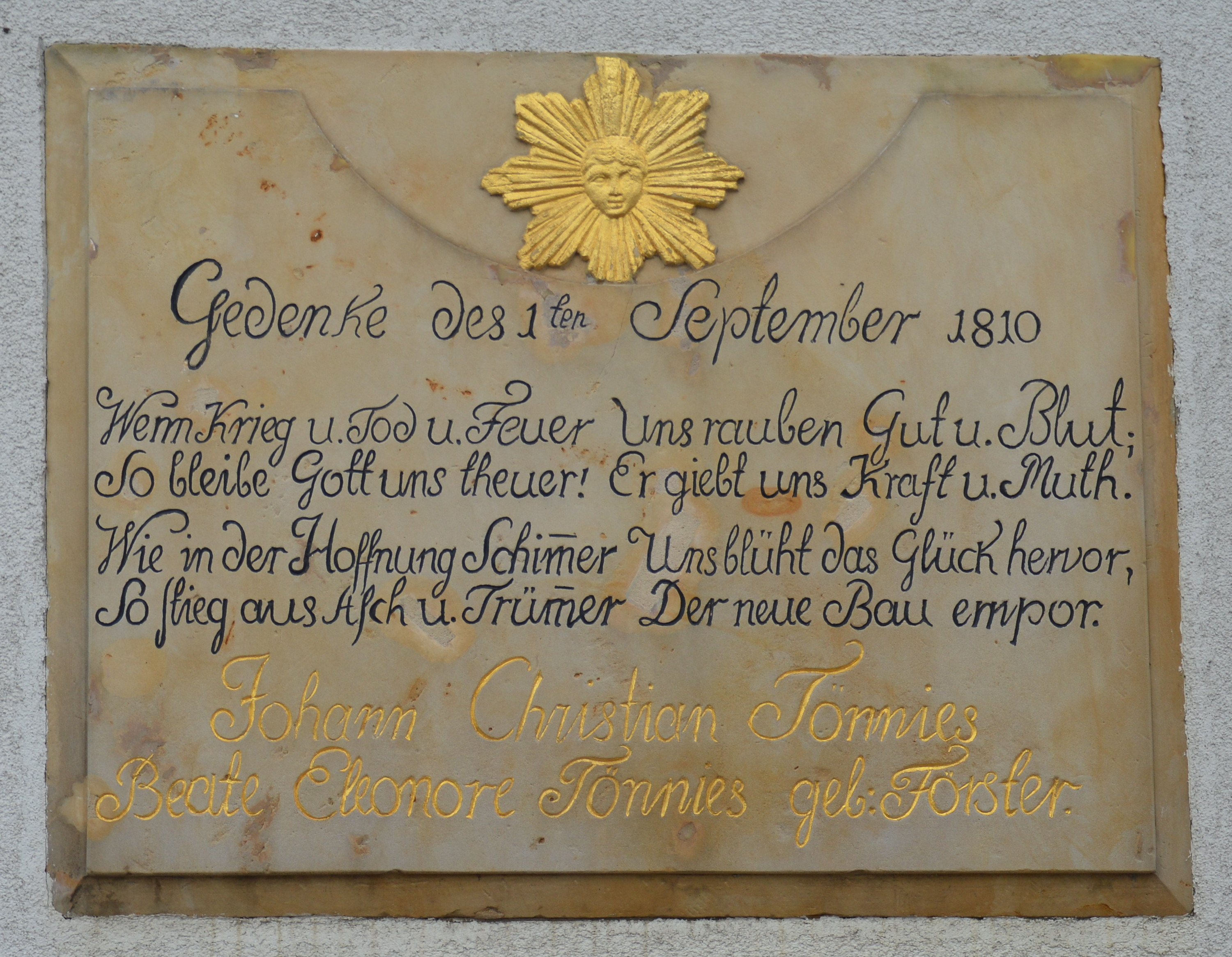 Tafel am Haus Alt Ottersleben 20